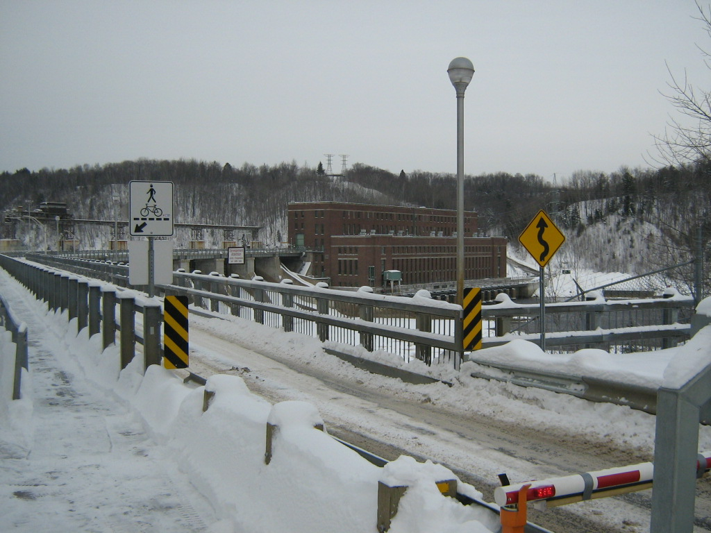 Centrale hydroélectrique de La Gabelle, vue de Saint-Étienne-des-Grès